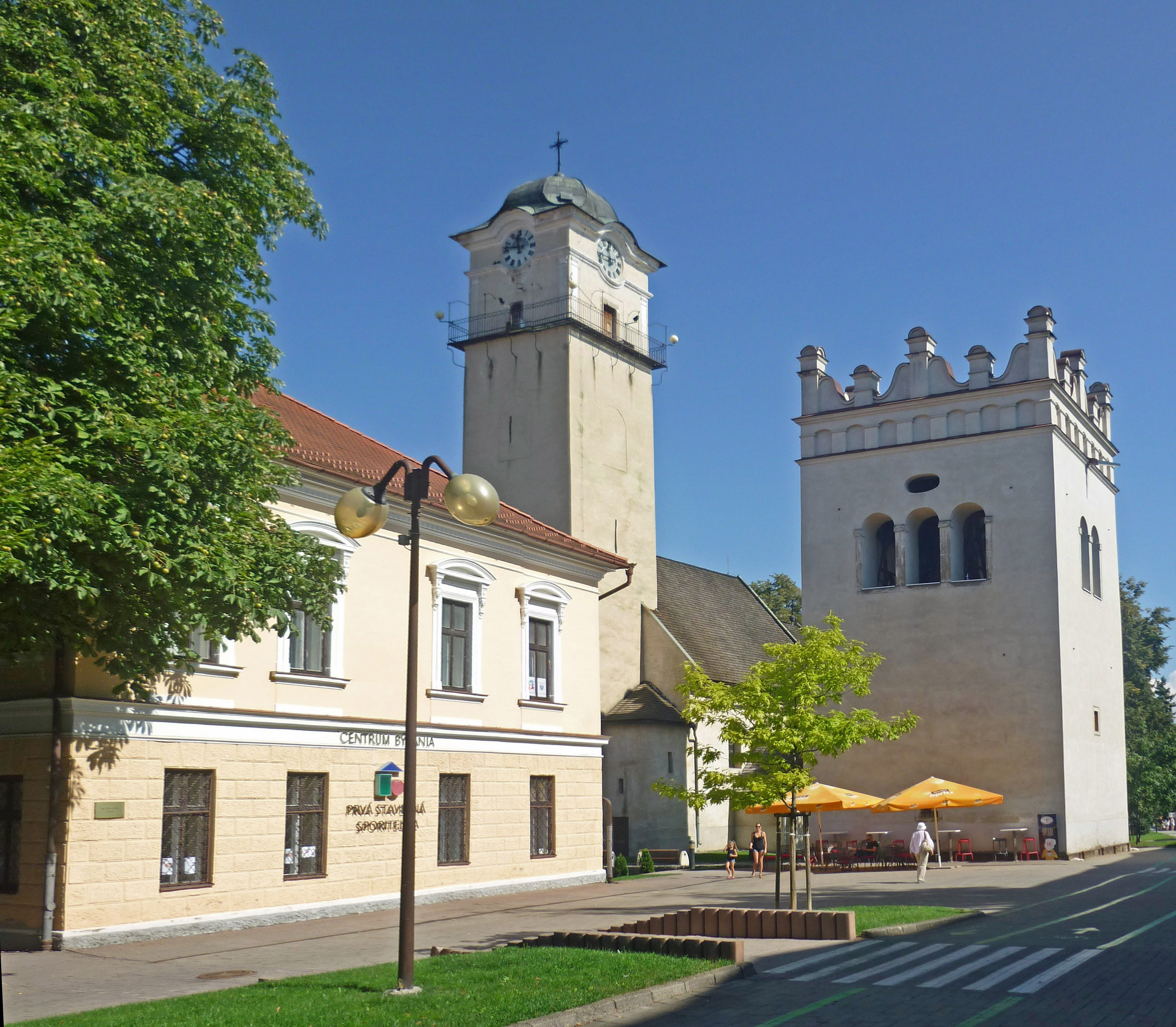 Ägidienkirche in Poprad (Deutschendorf) in der Slowakei